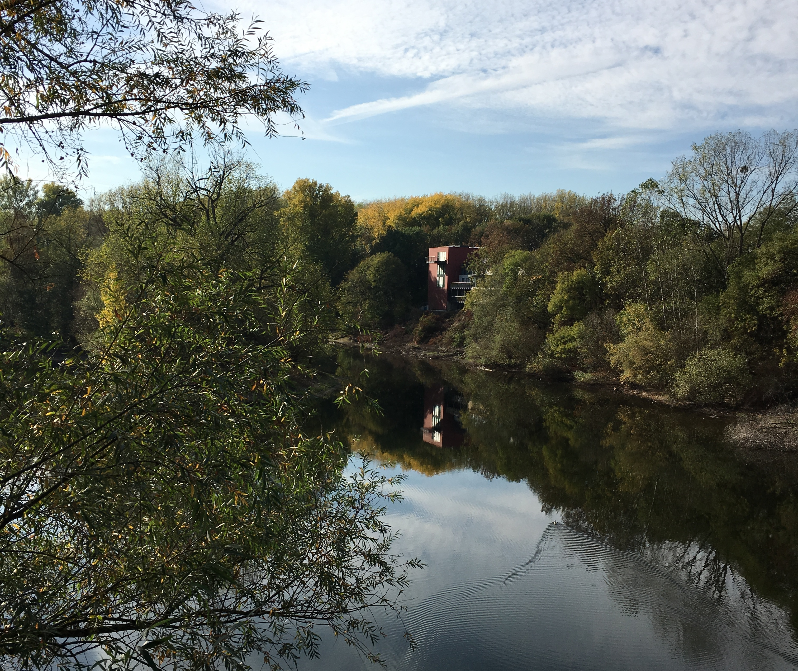 Deutschland, NRW: Fischereimuseum Bergheim an der Sieg bei Troisdorf; auch Sitz der historischen Fischereibruderschaft zu Bergheim an der Sieg.